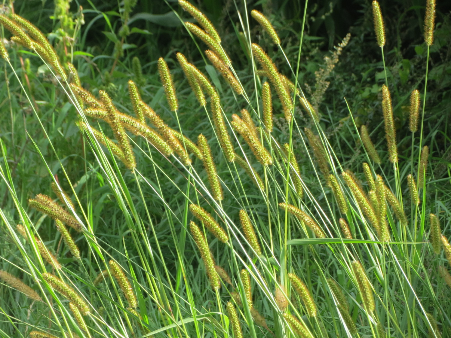 Rote Borstenhirse (Setaria pumila) bei Reilingen